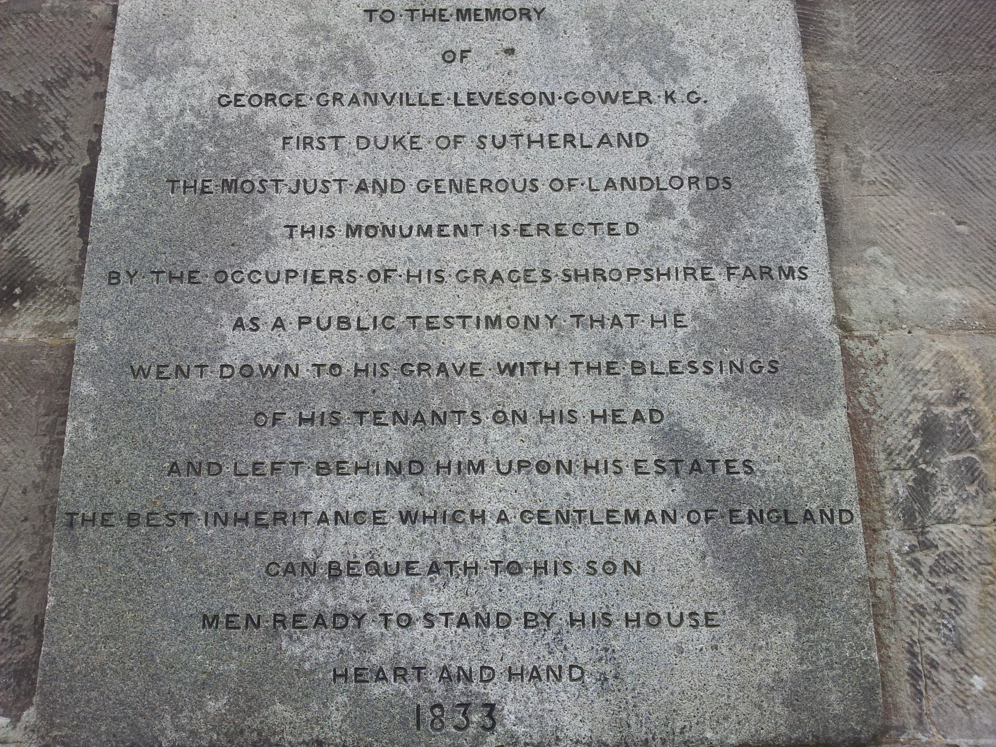 Inscription on monument